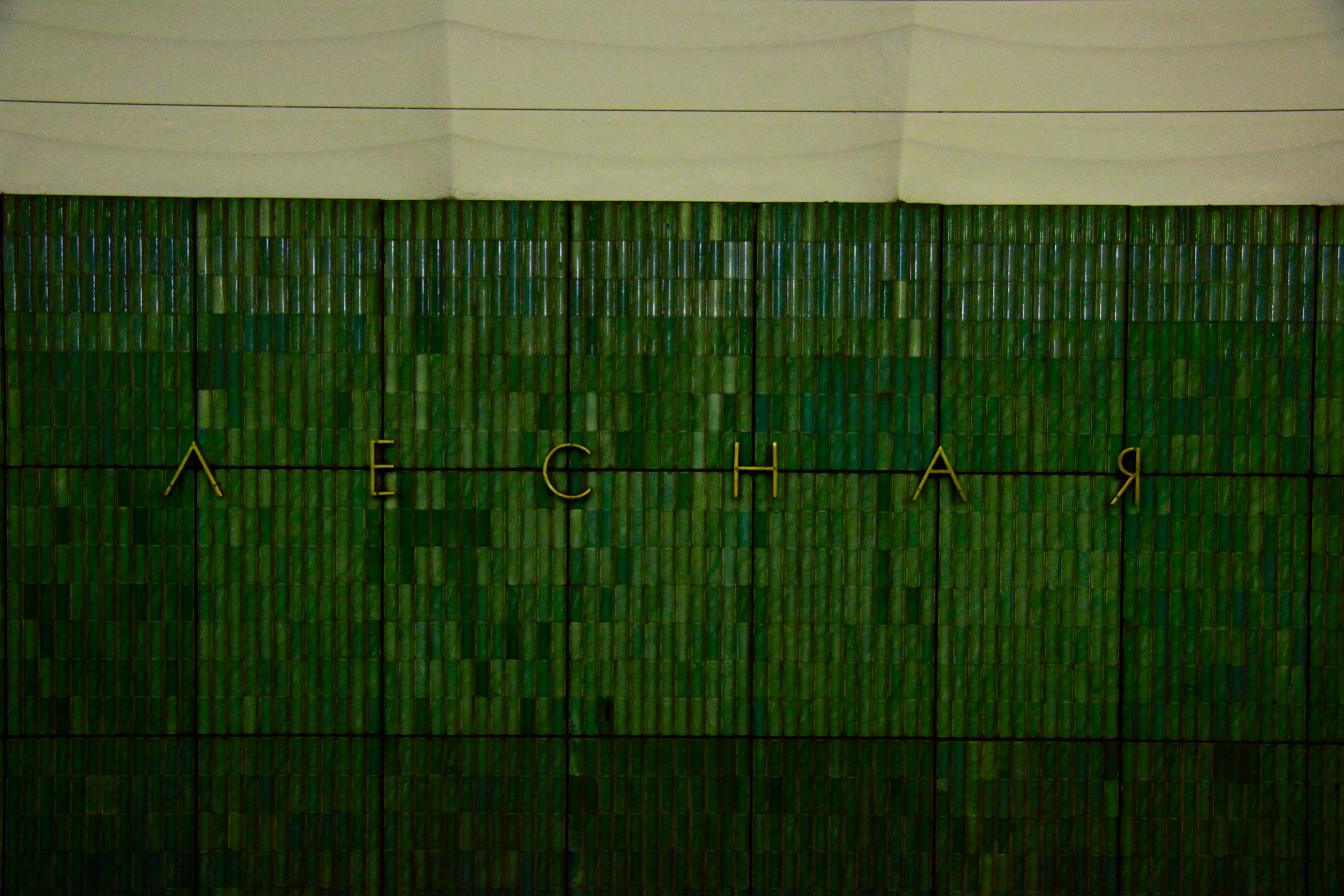 Путевая стена станции метро Лесная в Петербурге до красной разметки. Original tiling of side wall. Saint Petersburg, Russia, Lesnaya metro station. St. Petersburg Metro (Петербургский метрополитен) Kirovsko-Vyborgskaya Line (Кировско-Выборгская линия)